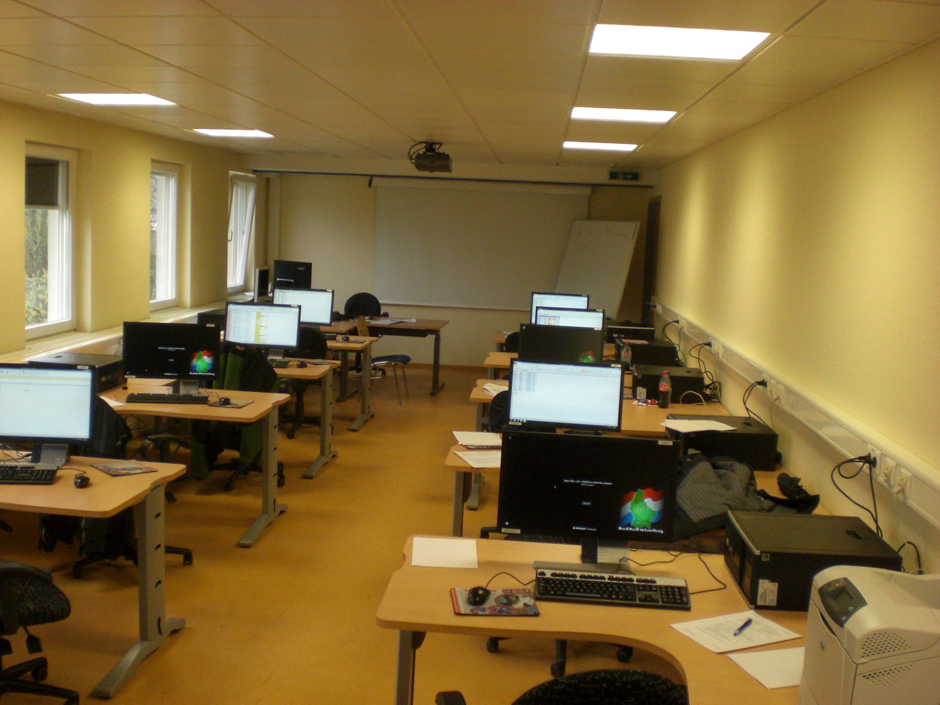 Salle de formation 2: EDV